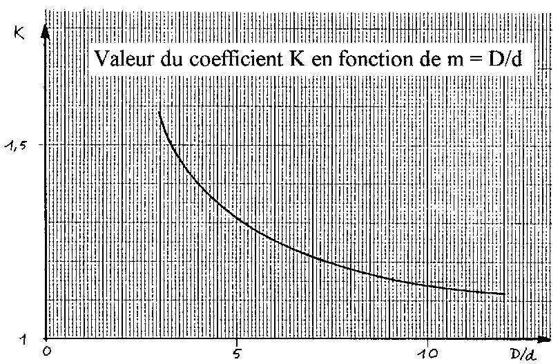 coefficient correcteur K Dessin original de Jean-Jacques MILAN, reproduction libre